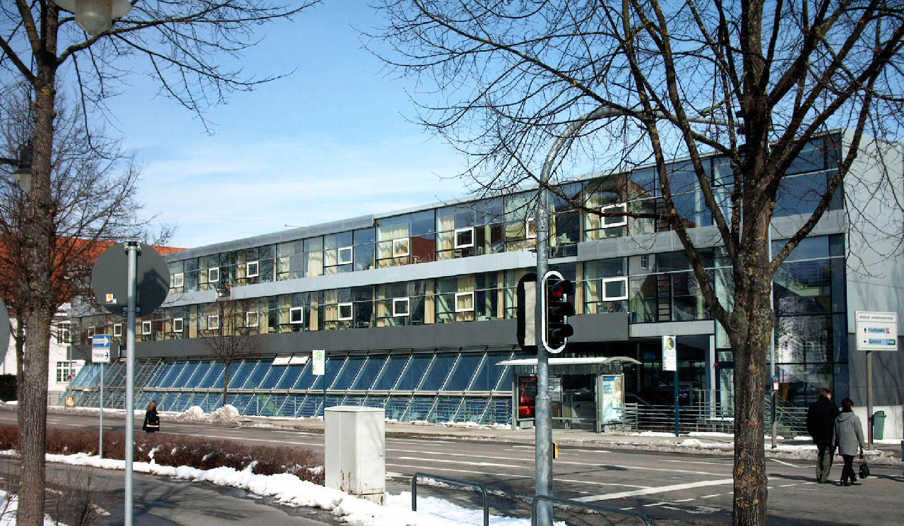 Fachhochschule Ingolstadt, Gebäudeteil A (Westseite)